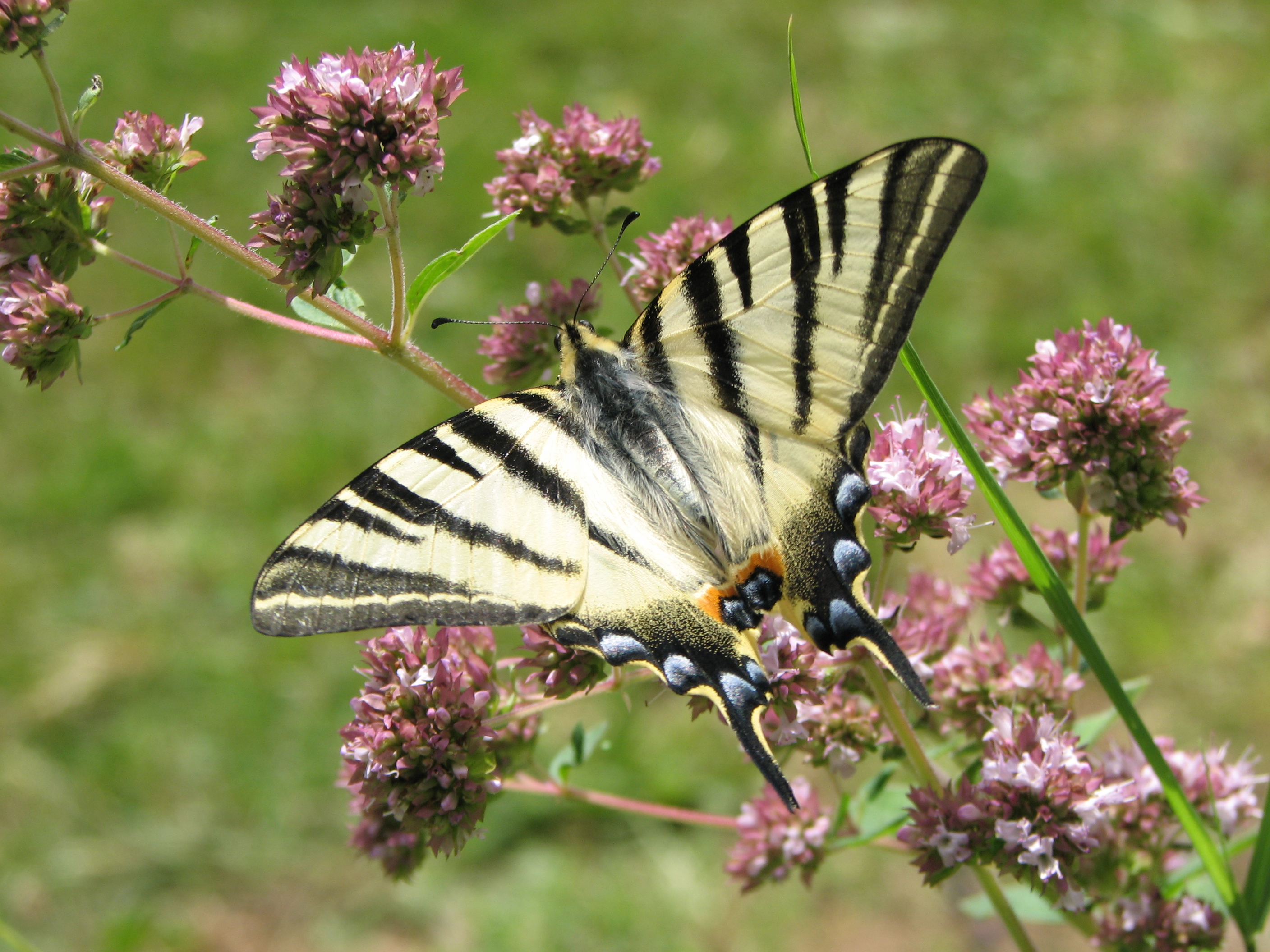 Un flambé (Iphiclides podalirius)